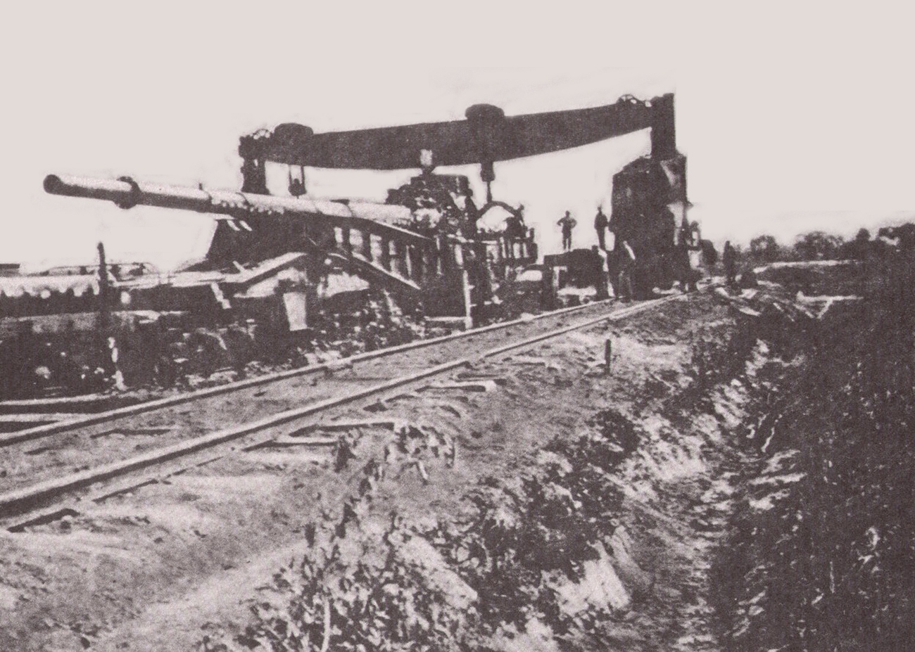 Montage des Parisgeschützes